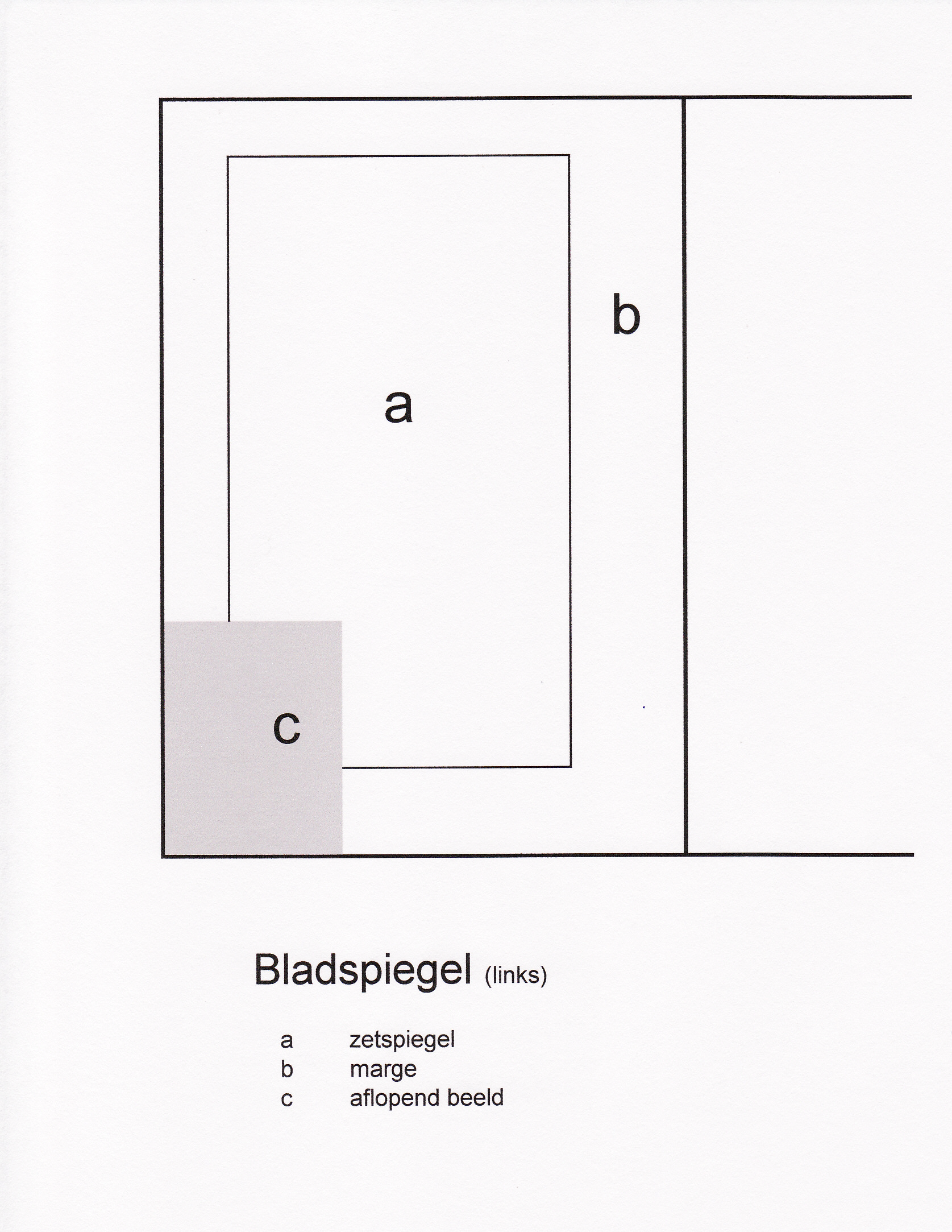 distribution of type elements on a printed page